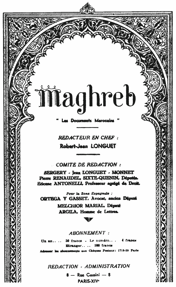 Fac-similé de la page de garde de la revue, Maghreb 1930 Paris